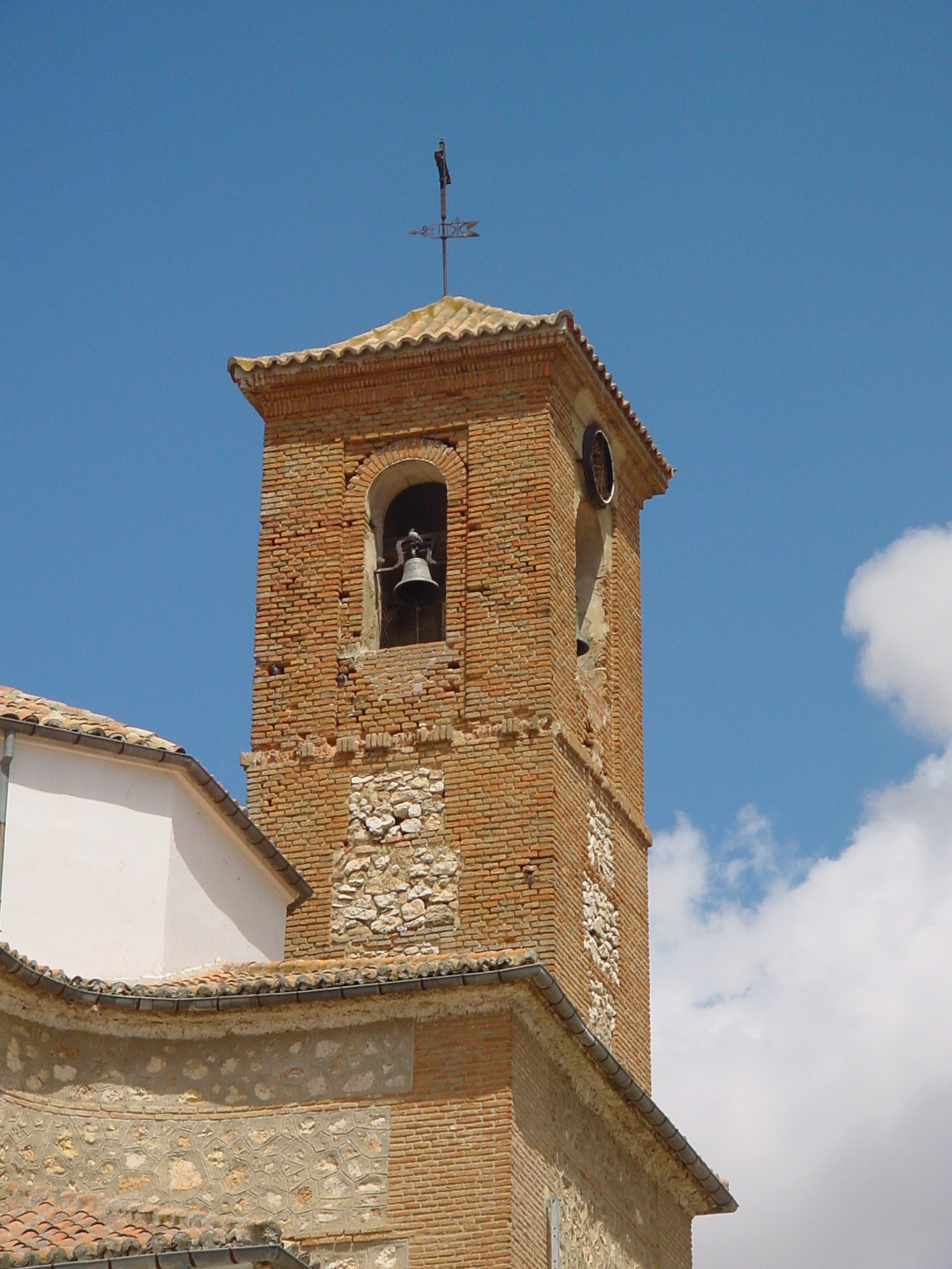 Vista de campanario de iglesia en Orusco de Tajuña.